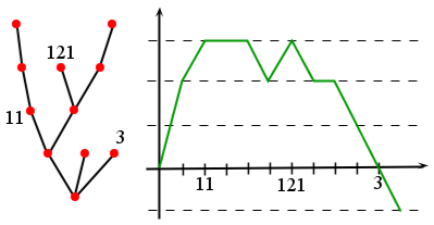 marche de Lukasiewicz